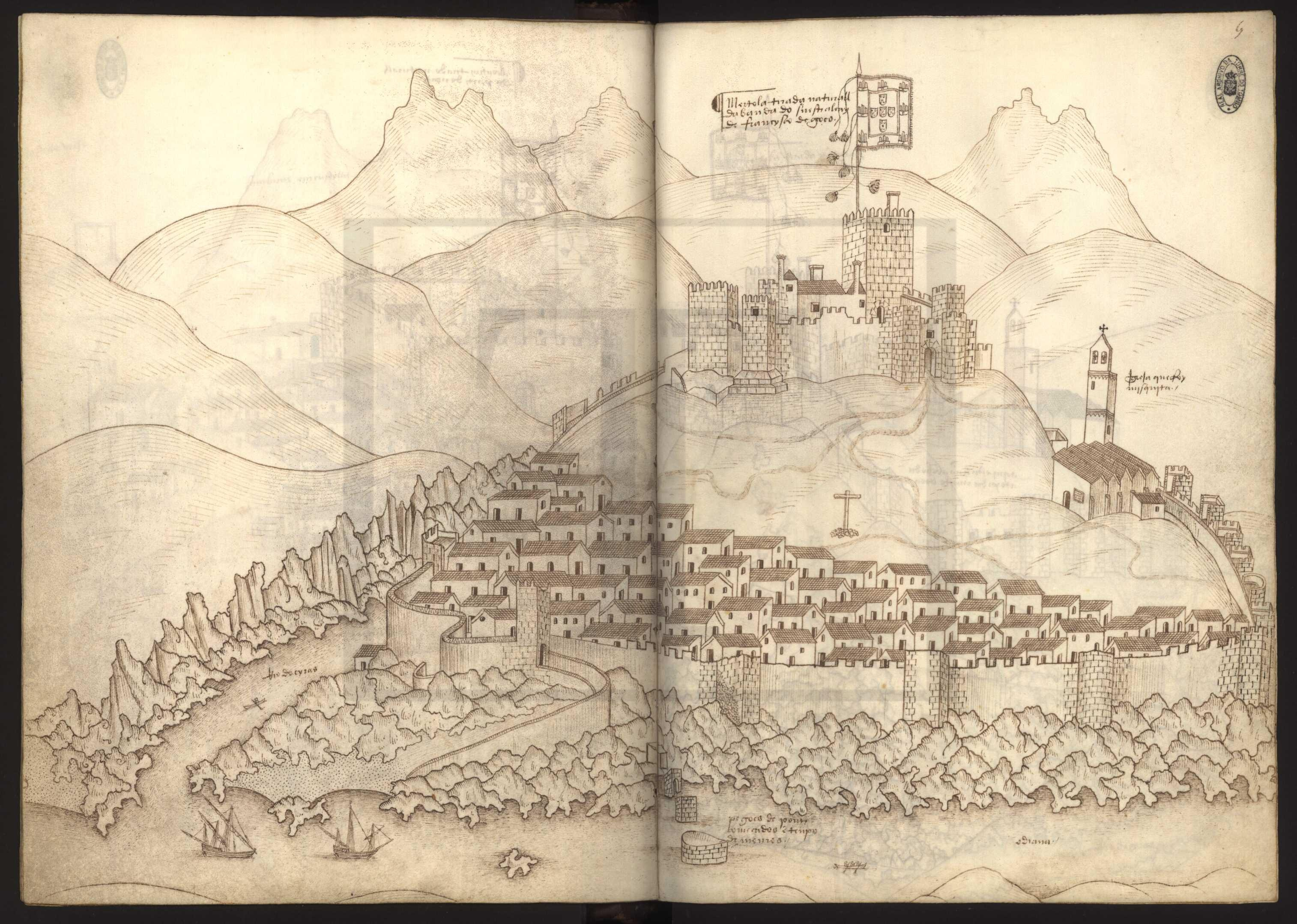 Livro das Fortalezas 5 - Mértola